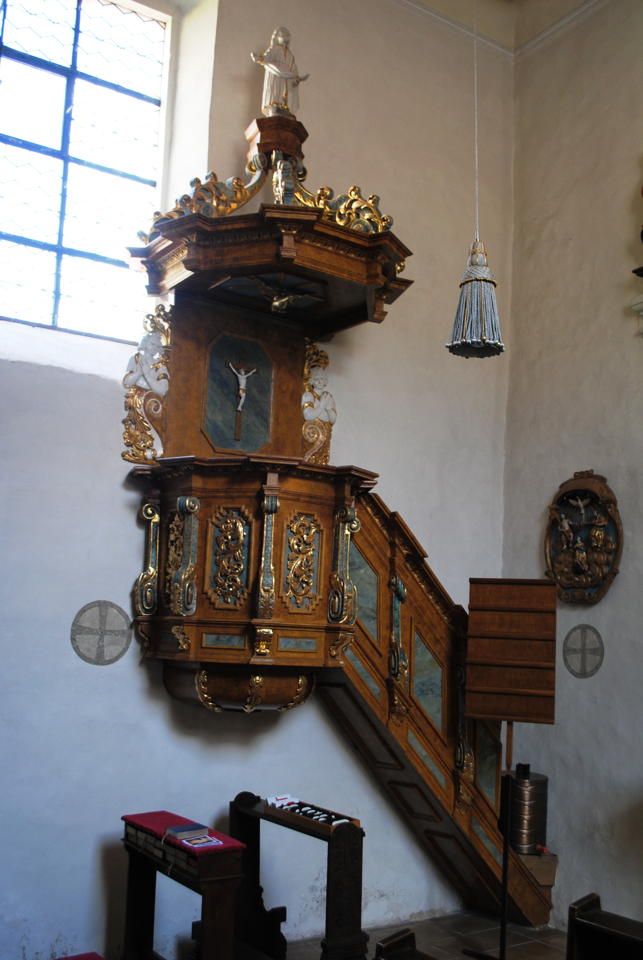 Kanzel, Kirche Köhler St. Andreas